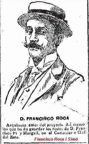 Retrato del architecto catalan Francisco Roca i Simó publicado por El Pais el 24.6.1905